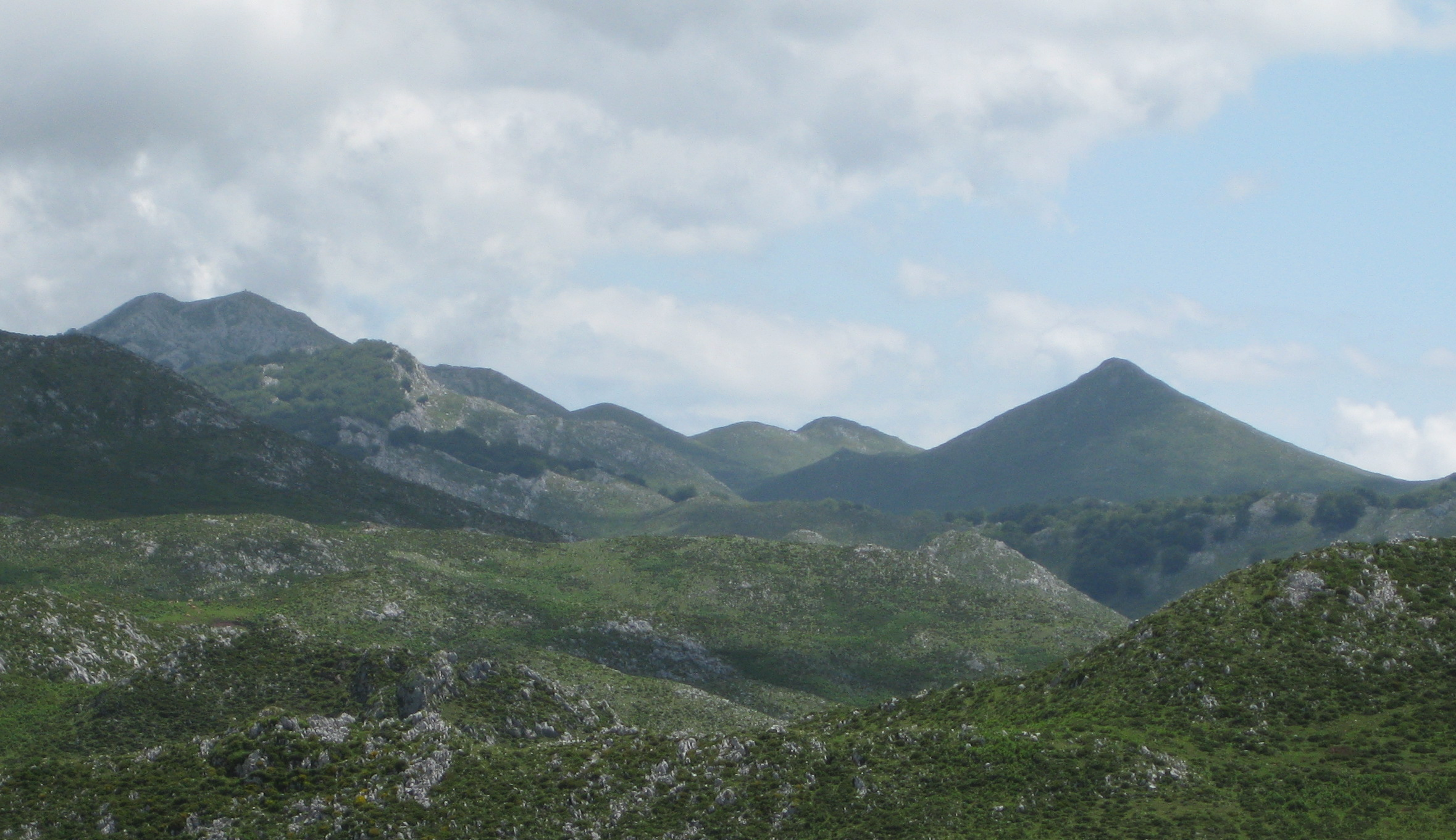 Peña Turbina (left) and Peña Llacia, Sierra de Cuera, Spain